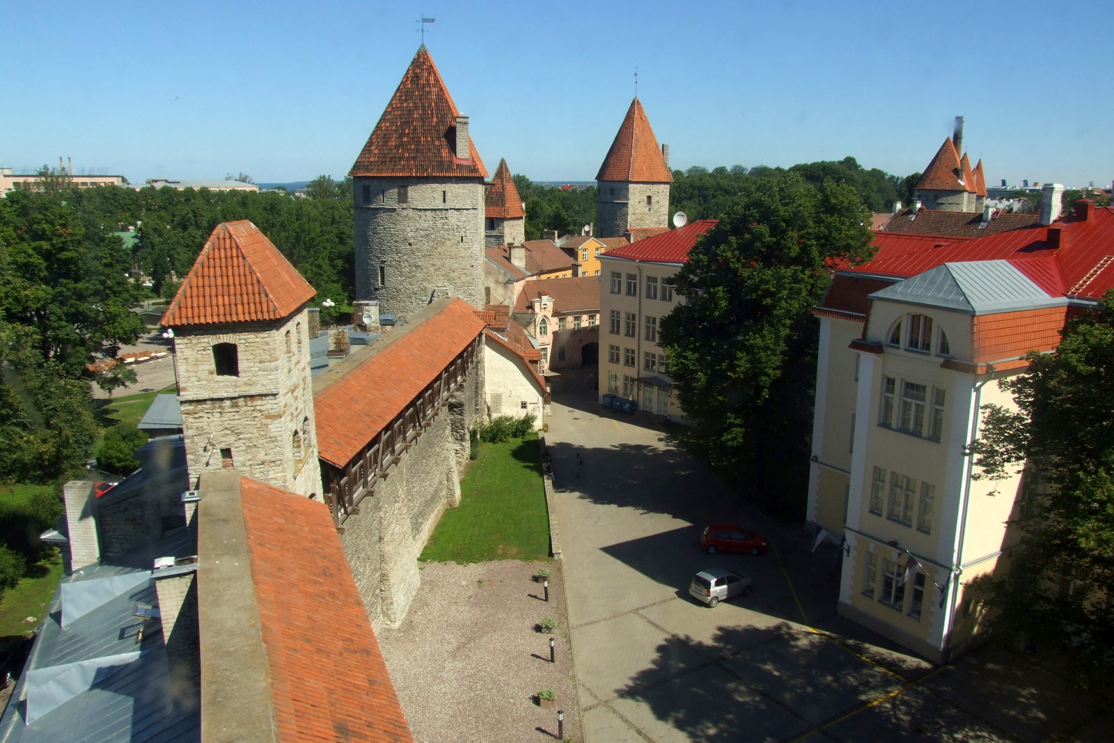 Vaade Nunnatornist põhja poole